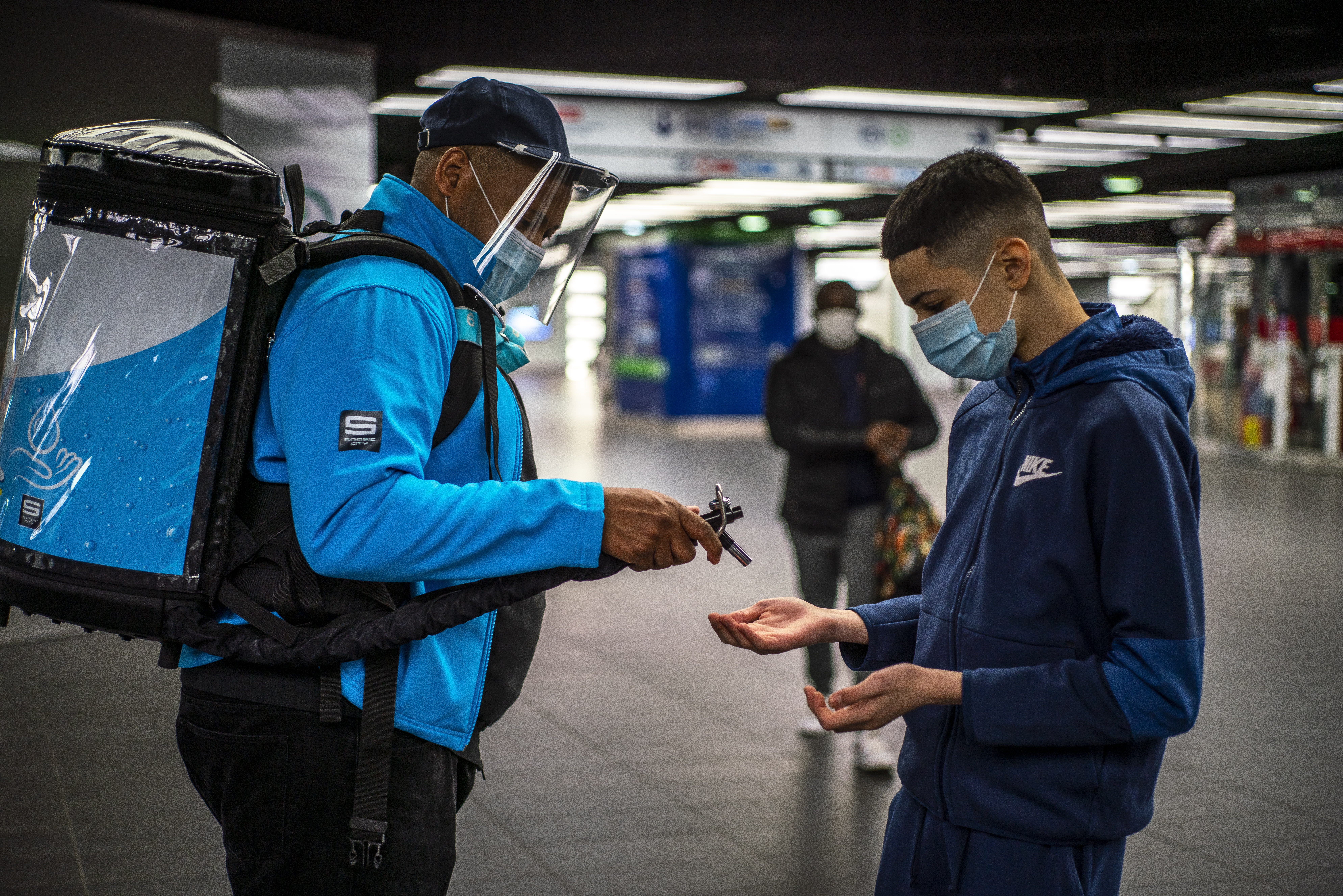 Distribution de gel hydroalcoolique à Châtelet